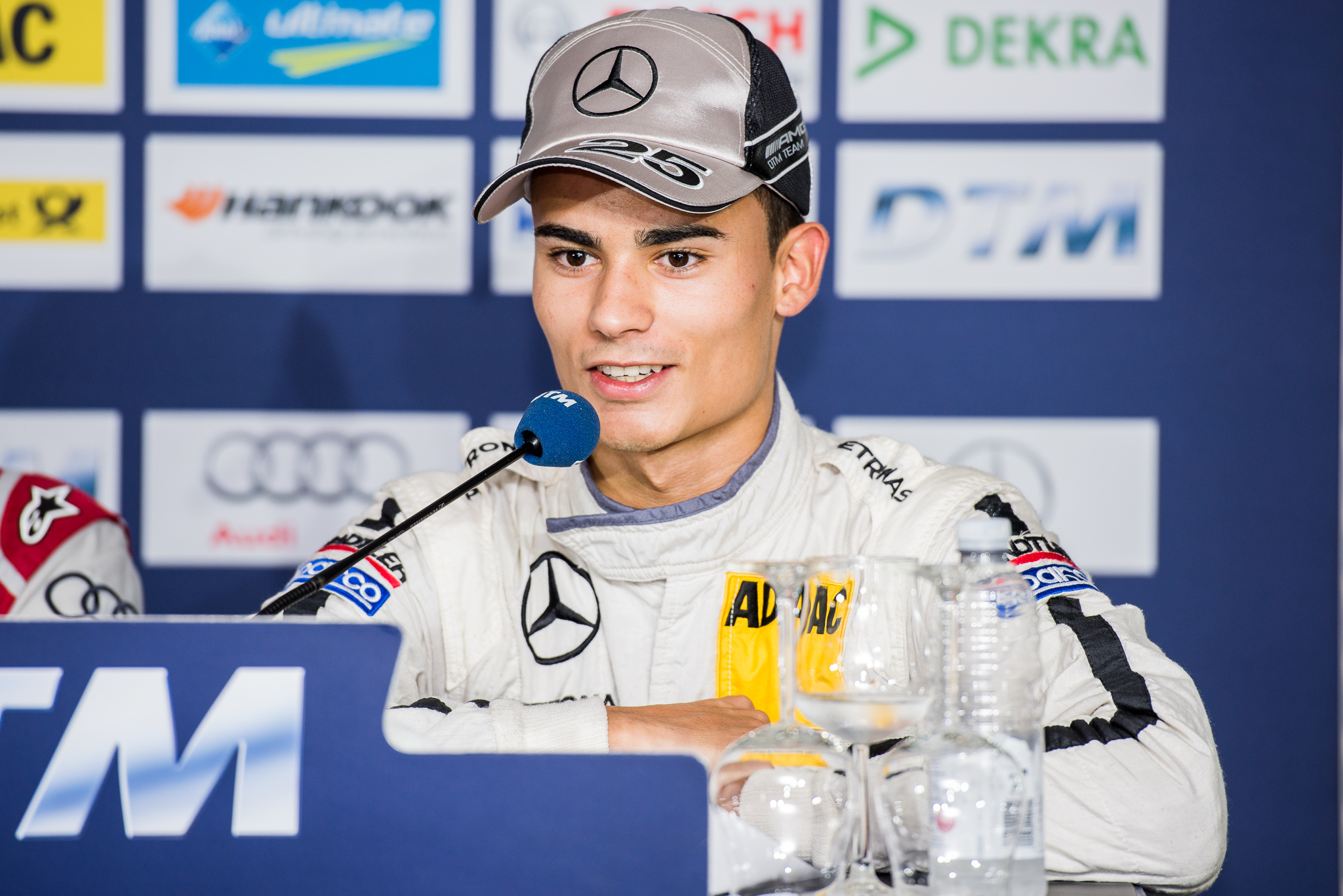 DTM,Deutsche Tourenwagen Masters,HWA AG,Hockenheimring,Motorsport,Pascal Wehrlein,Pressekonferenz